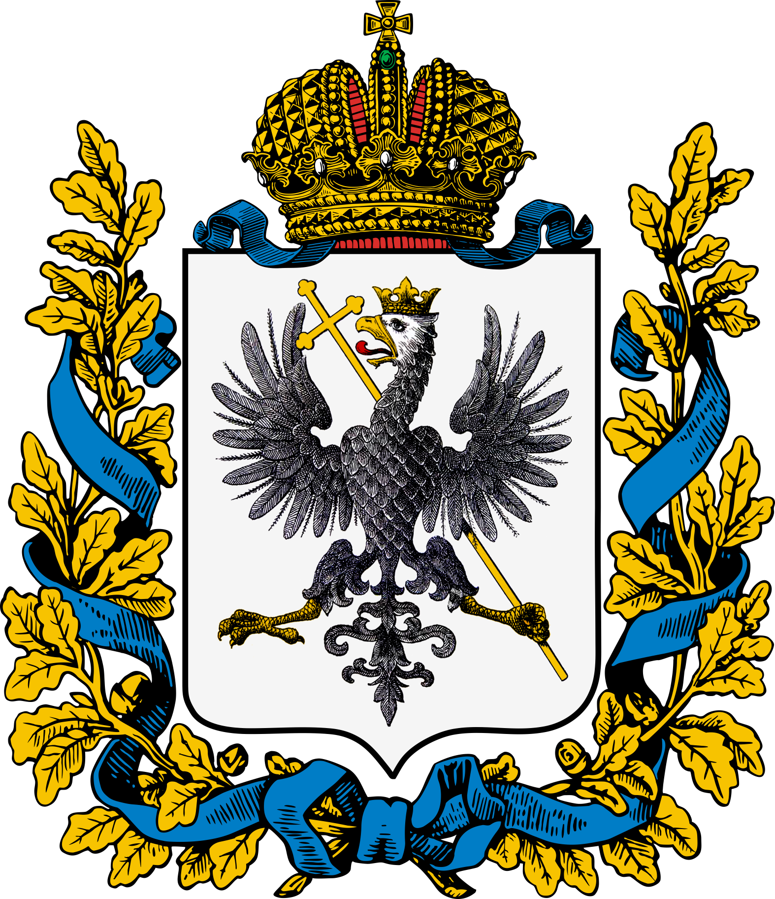 Герб Черниговской губернии, утверждённый 8 декабря 1856 года